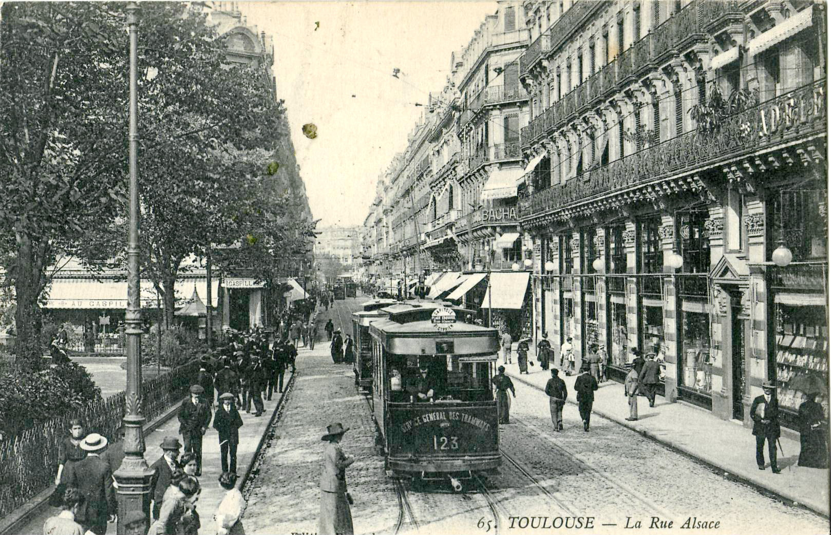 Carte postale ancienne sans mention d'éditeur, n°65 : "TOULOUSE - La Rue Alsace"